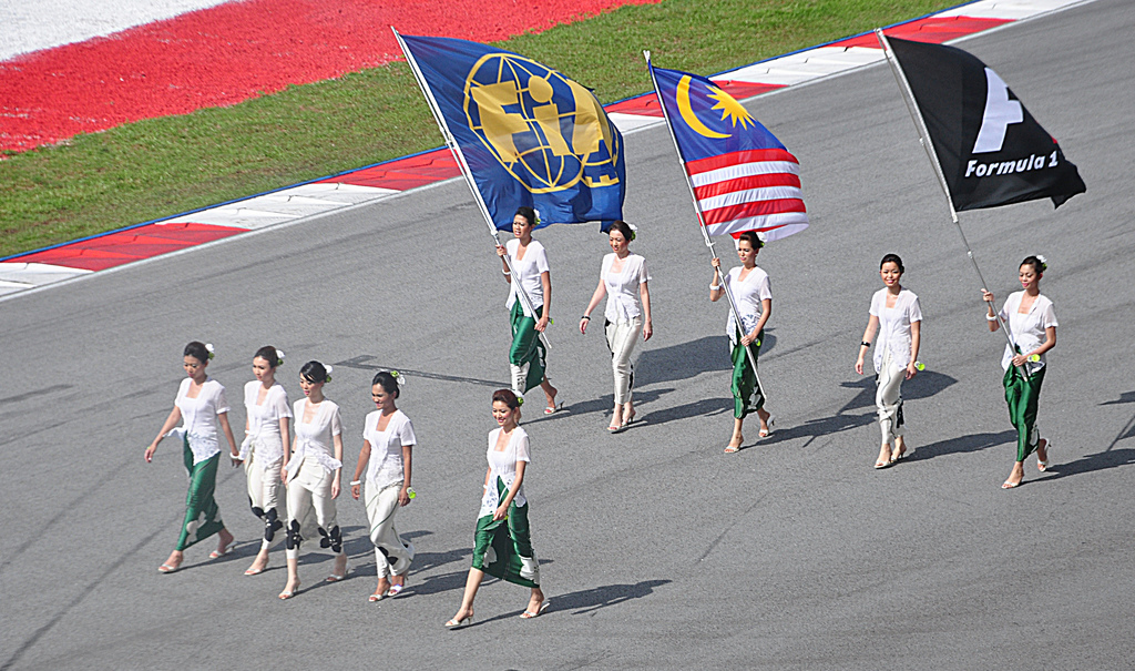 parade avant le GP de malaisie 2009